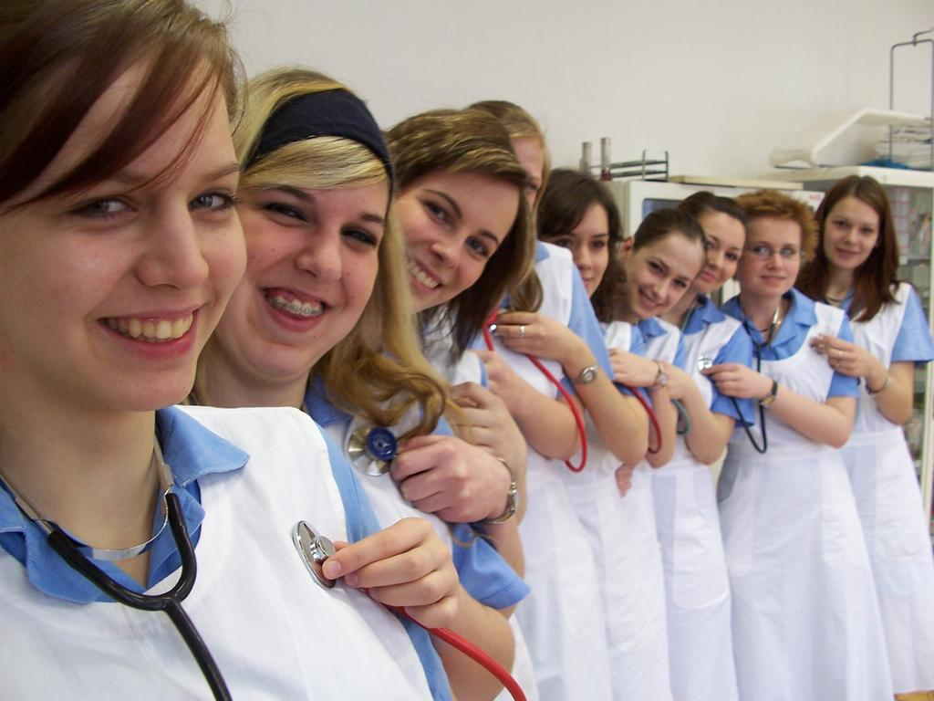 Czech nursing students.